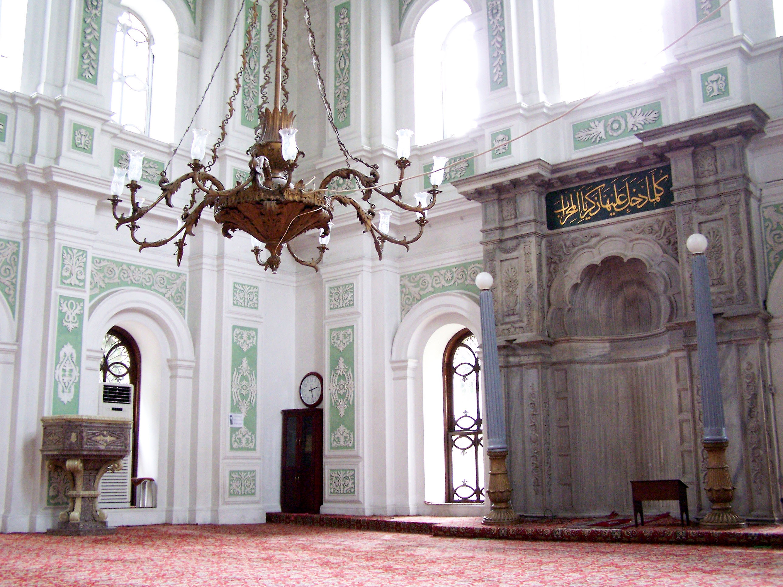 Mihrap of Küçük Mecidiye Camii in Beşiktaş, İstanbul, Turkey